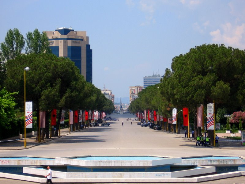 Bulevardi Deshmoret e Kombit